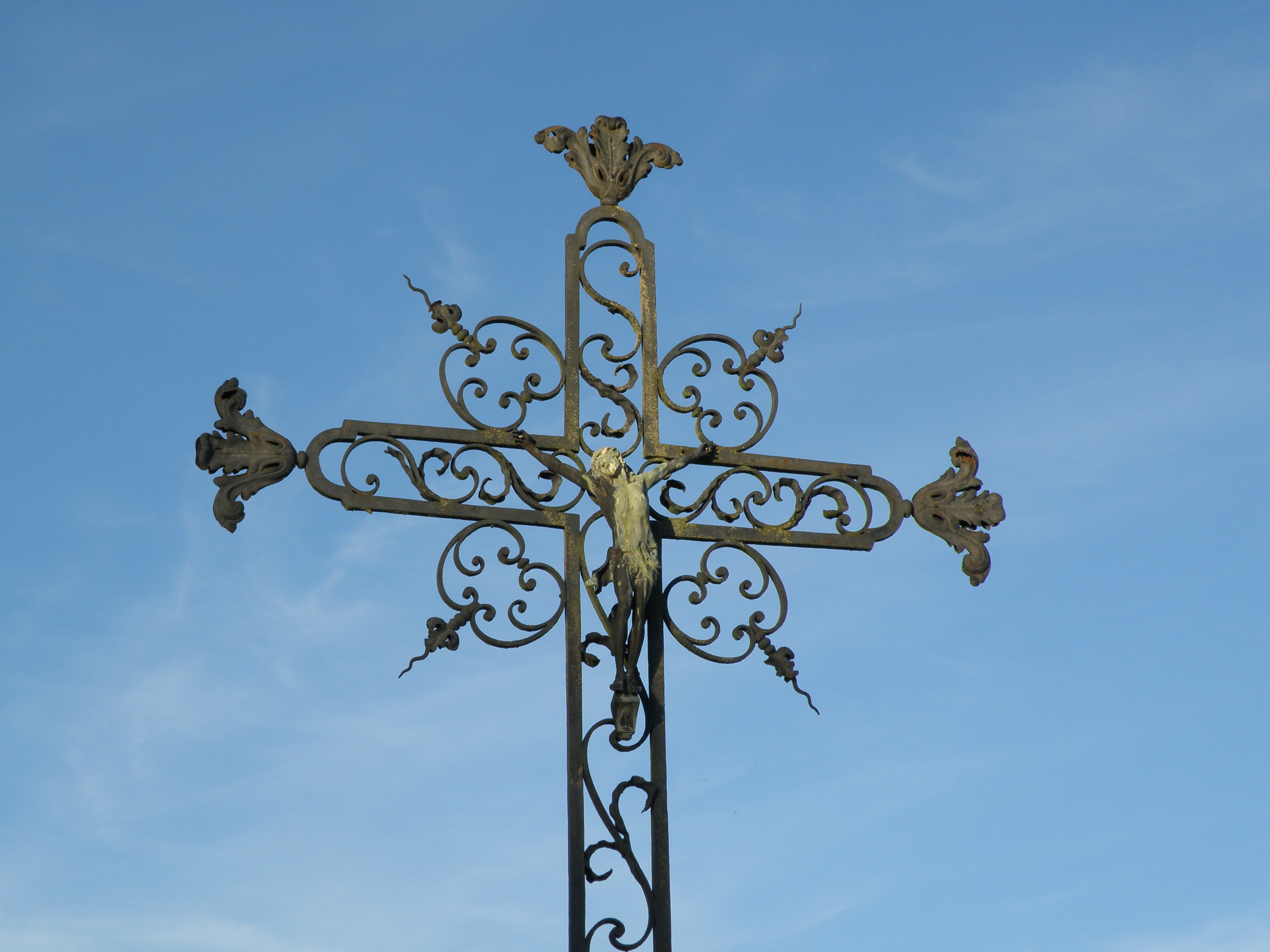 Croix du cimetière de Fouchères. 10260 Fouchères.